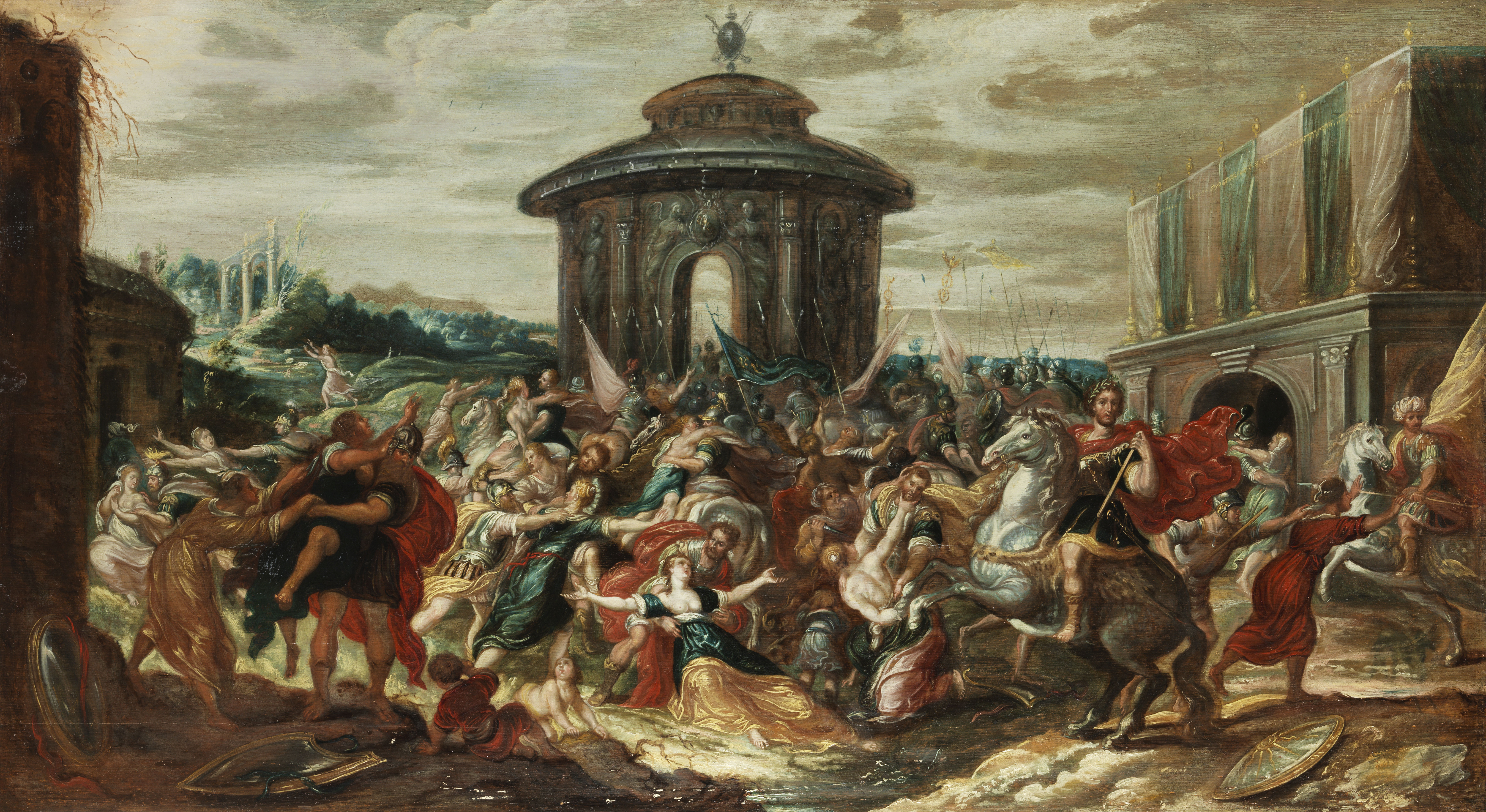 Raub der Sabinerinnen. Öl auf Eichenholz. 51 x 92 cm